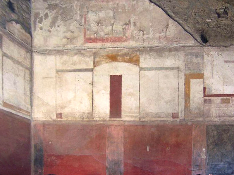 Wall painting in the Casa dei Cei in Pompeii, Atrium Affreschi nel terzo stile pompeiano, nella Casa dei Cei in Pompeii.